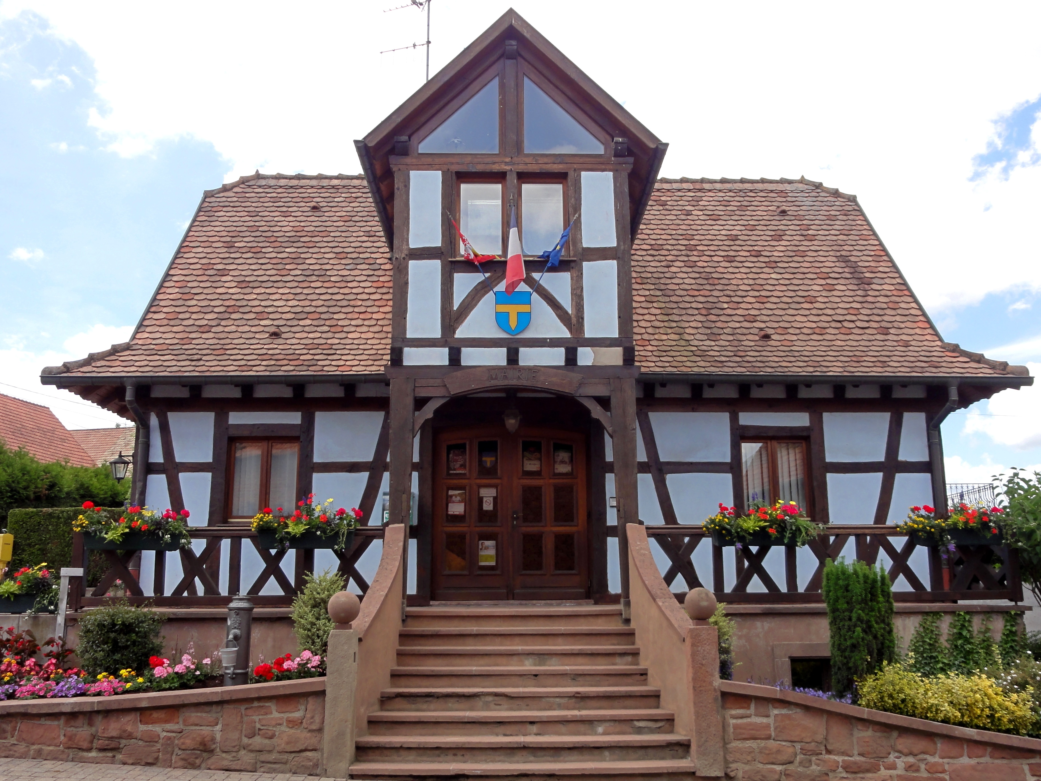 Alsace, Bas-Rhin, Bossendorf, Mairie.